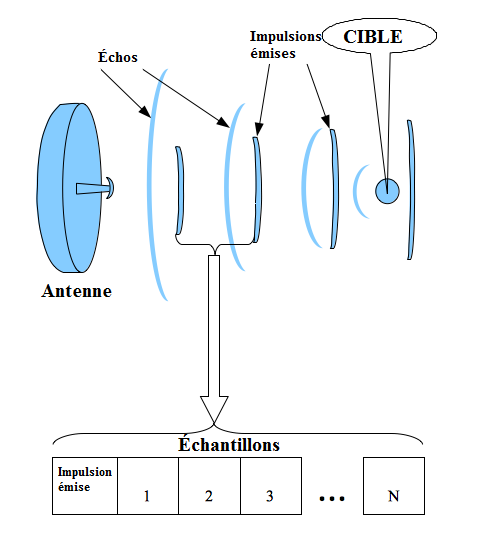 Le traitement du signal d'un radar Doppler pulsé commence avec des échantillons prélevés entre plusieurs impulsions d'émission. La stratégie d'échantillonnage pour une période d'impulsion est représentée.